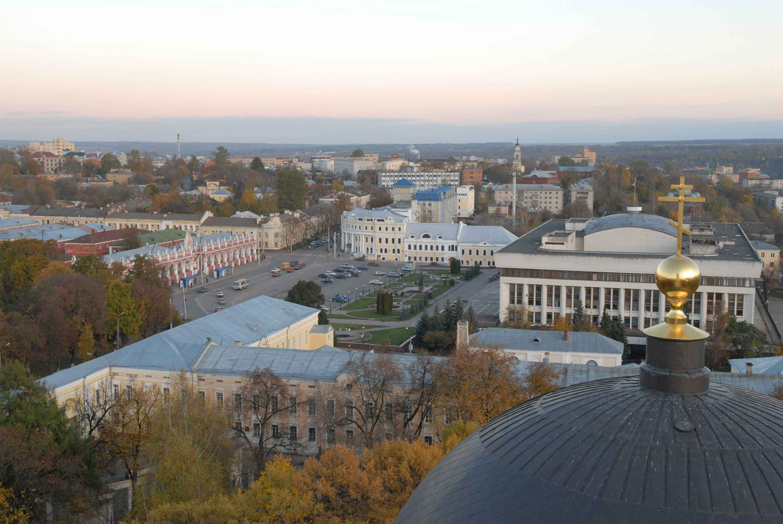 Калуга. Вид с колокольни Троицкого собора на восток. В центре площадь Старый Торг с гостиным двором (слева) и областной администрацией (справа)